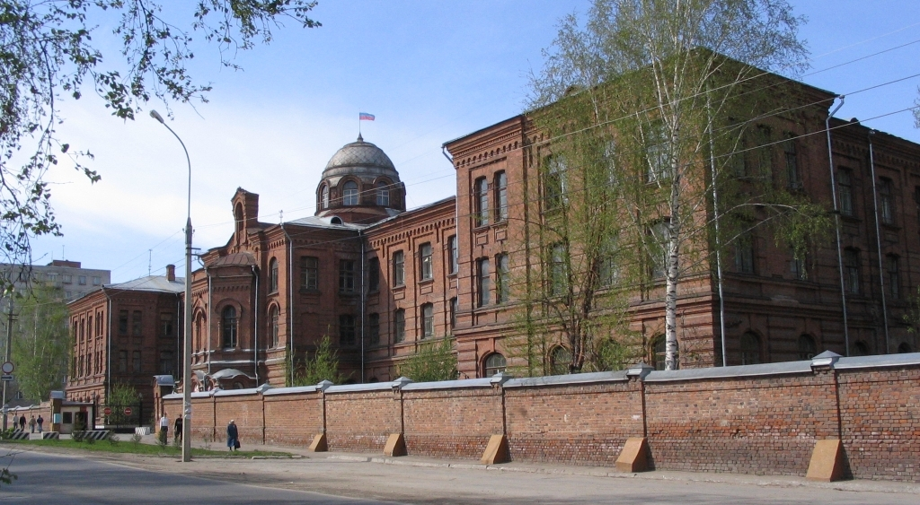 Томский военно-медицинский институт